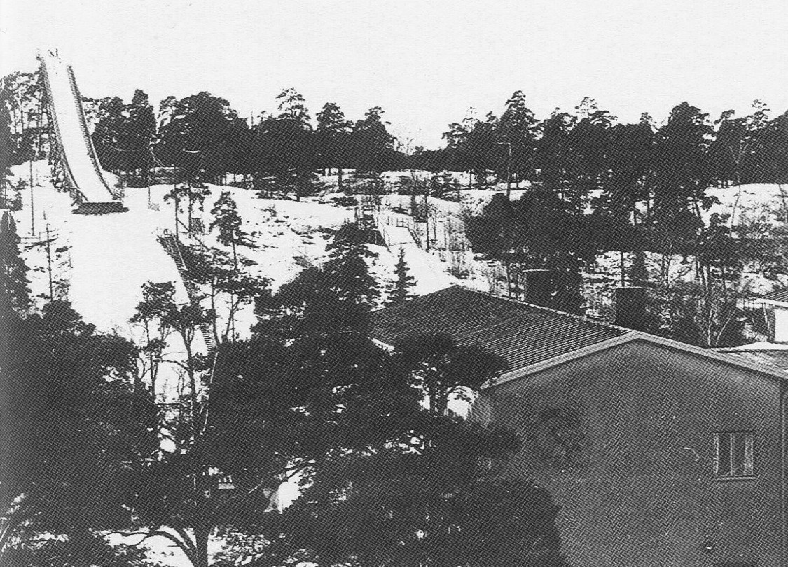 Enskedefältets hoppbackar med Enskedefältets skola i förgrunden